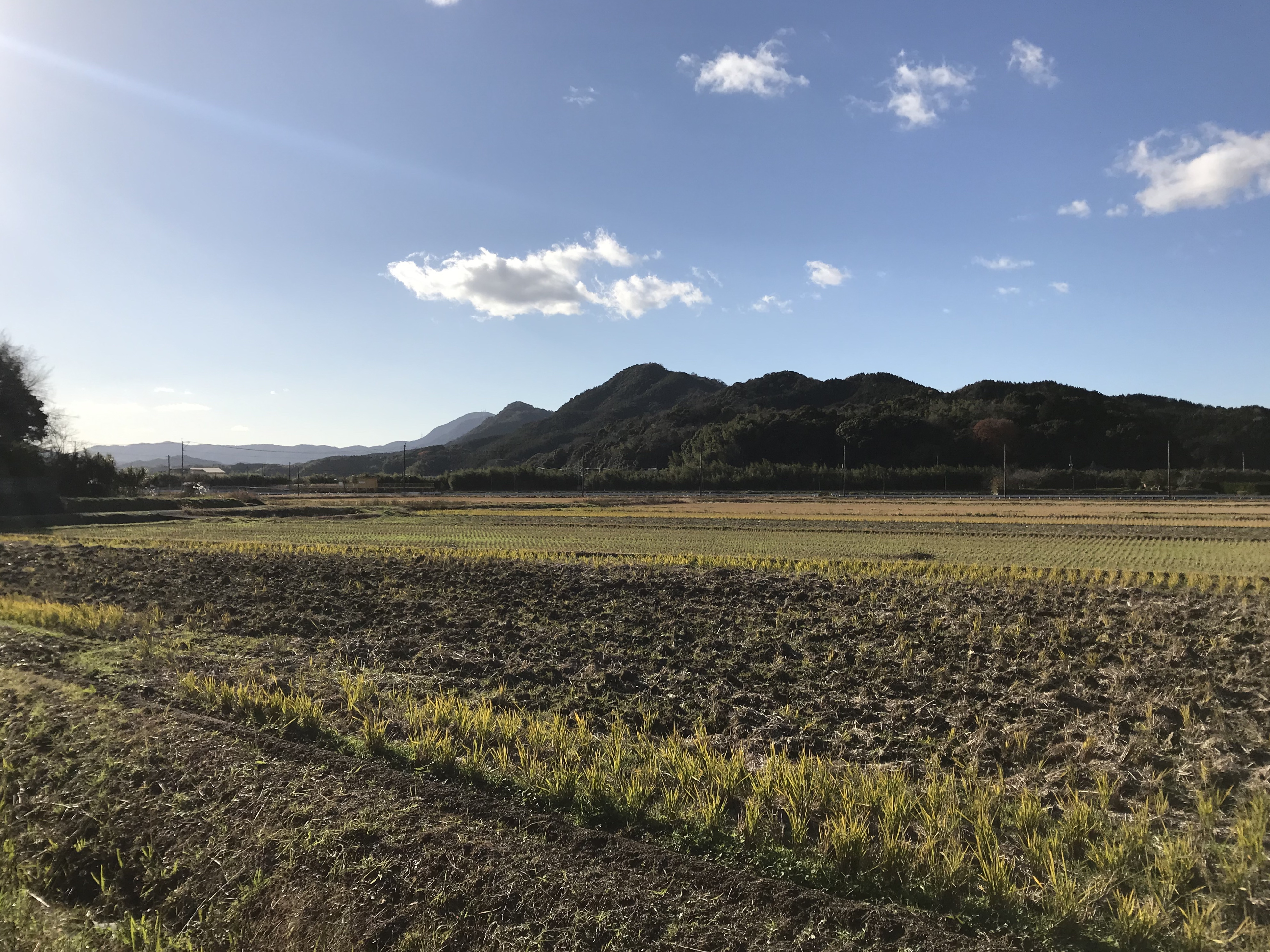 新豊津駅東側の田んぼ